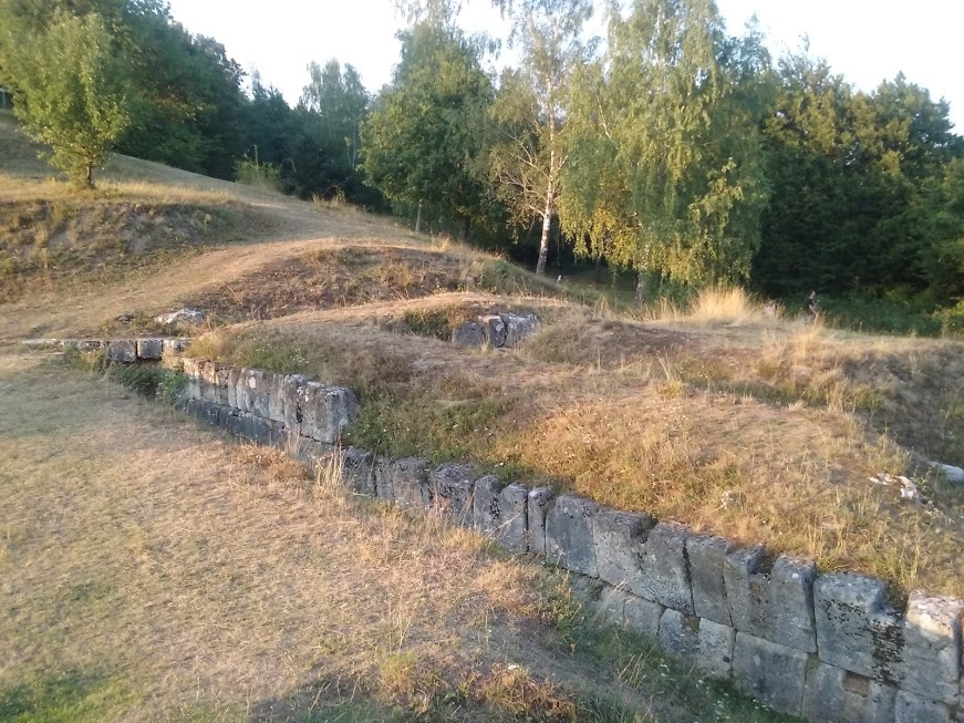 Zid de apărare sat Costești, comuna Orăștioara de Sus Cetățuia Înaltă, dincolo de Valea Sasului, sec. I a. Chr. - II p. Chr., Latène 02